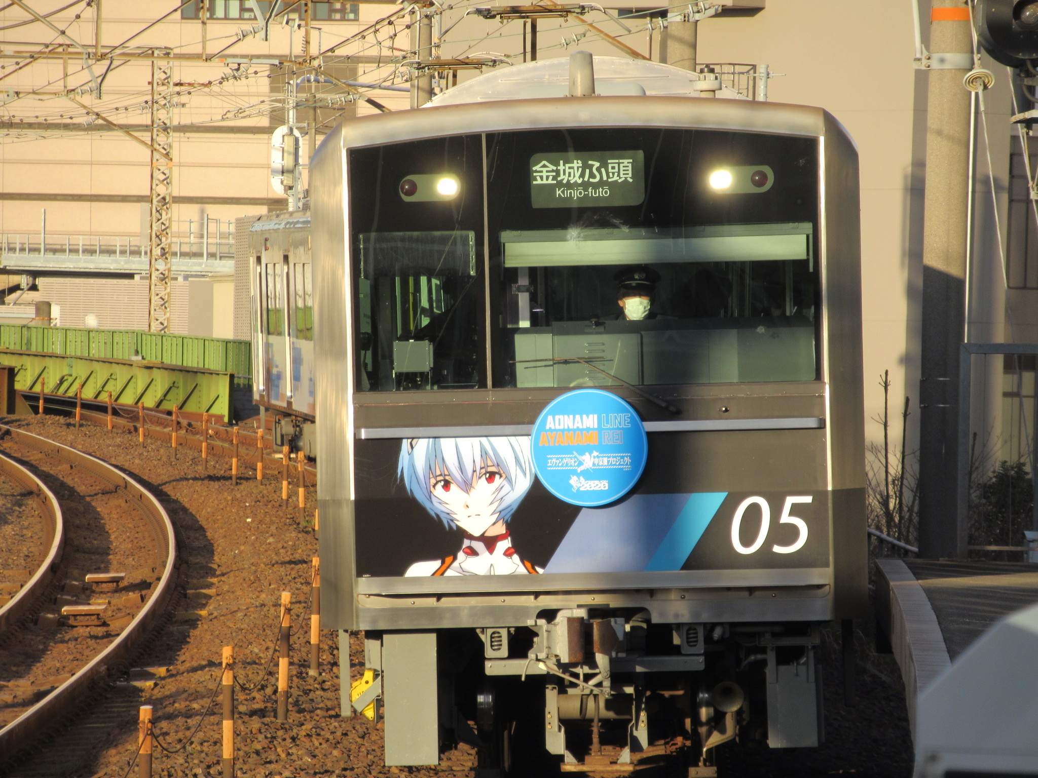 あおなみ線 綾波レイ ラッピング車両 ささしまライブ駅